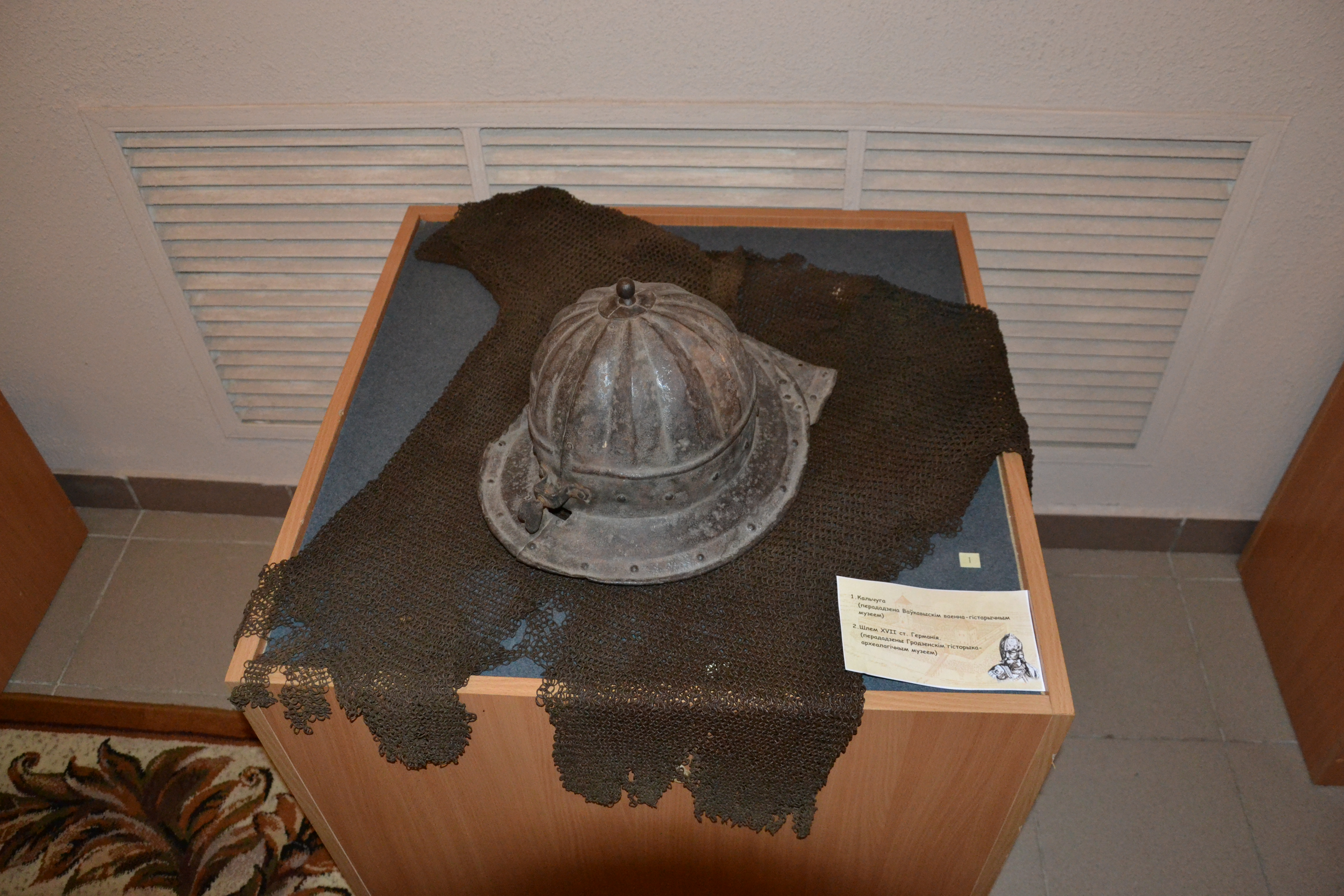 Кальчуга перададзена Ваўкавыскім ваенна-гістарычным музеем, Шлем 17 ст. (Германія) перададзены Гродзенскім гісторыка-археалагічным музеем. Выстаўка ў Лідскім гісторыка-культурным музеі